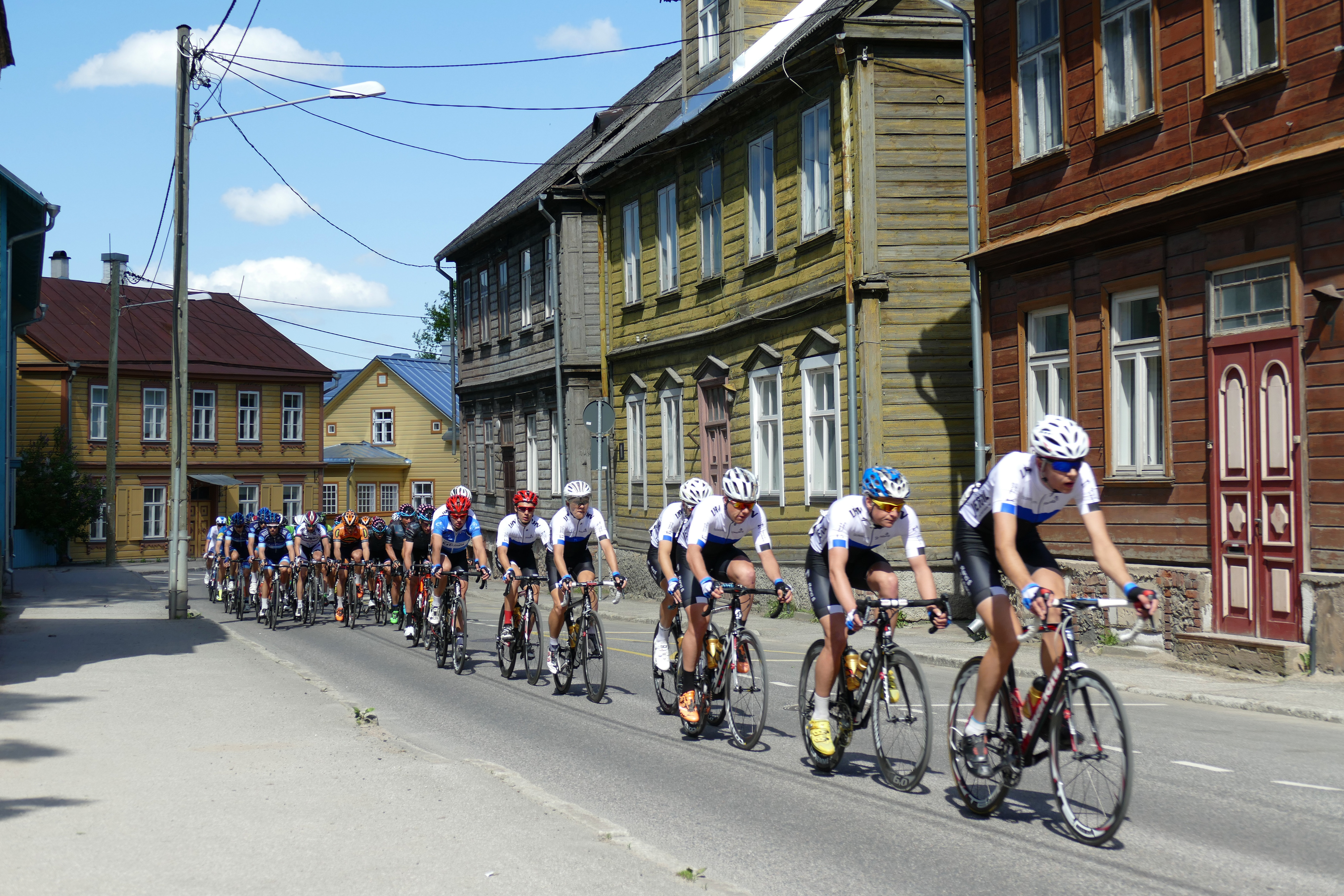 Tour of Estonia Tartu Grand Prix 2. etapp Tartu tänavatel 30.05.2015. Grupisõit 150km.